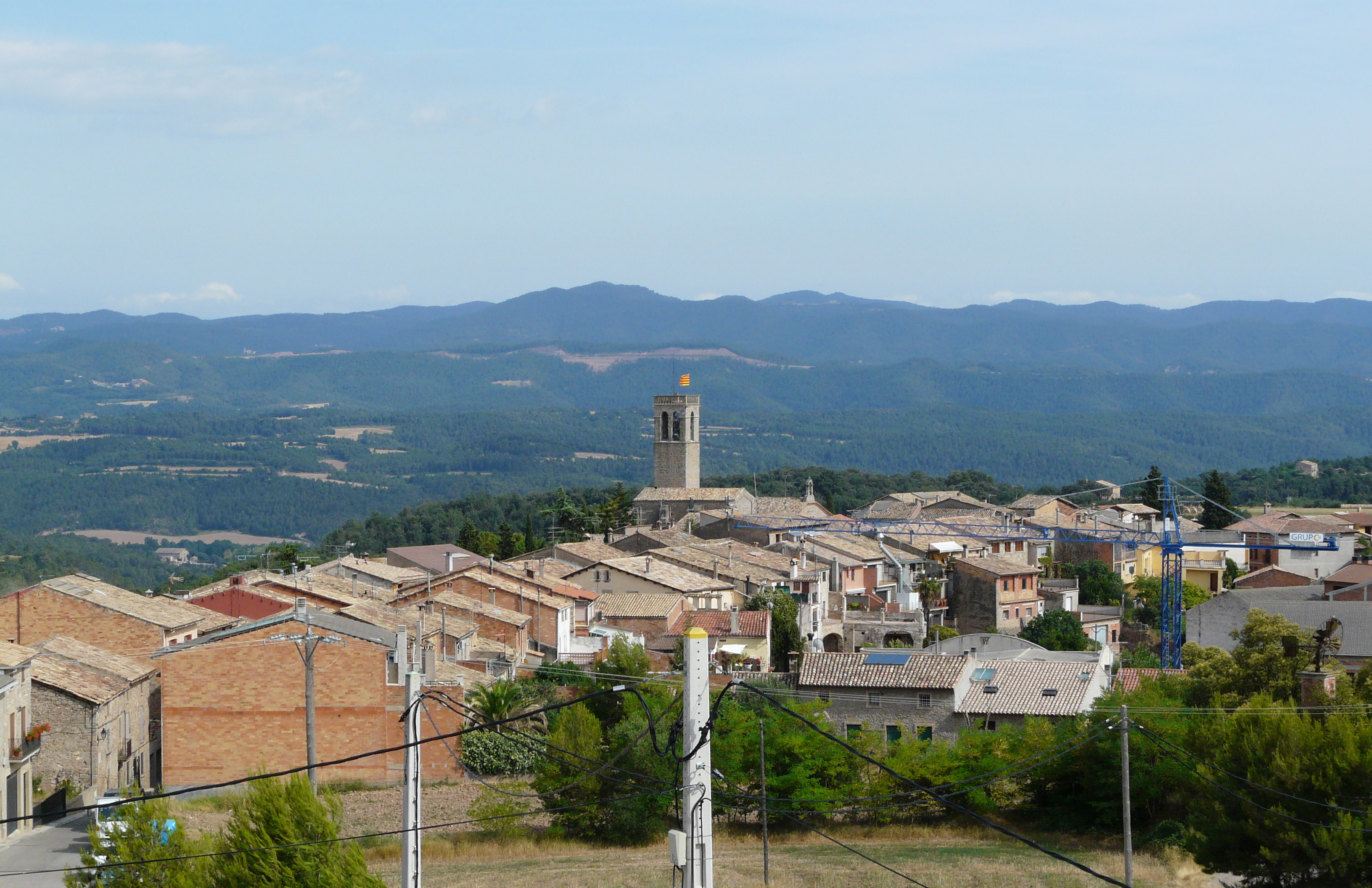 Vista parcial de Sant Feliu Sasserra vist des de la Glorieta Vilaclara, o sigui, mirant cap al sud. Al centre, l'església de Sant Feliu.